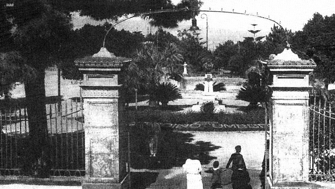 old postcard of Reggio Calabria